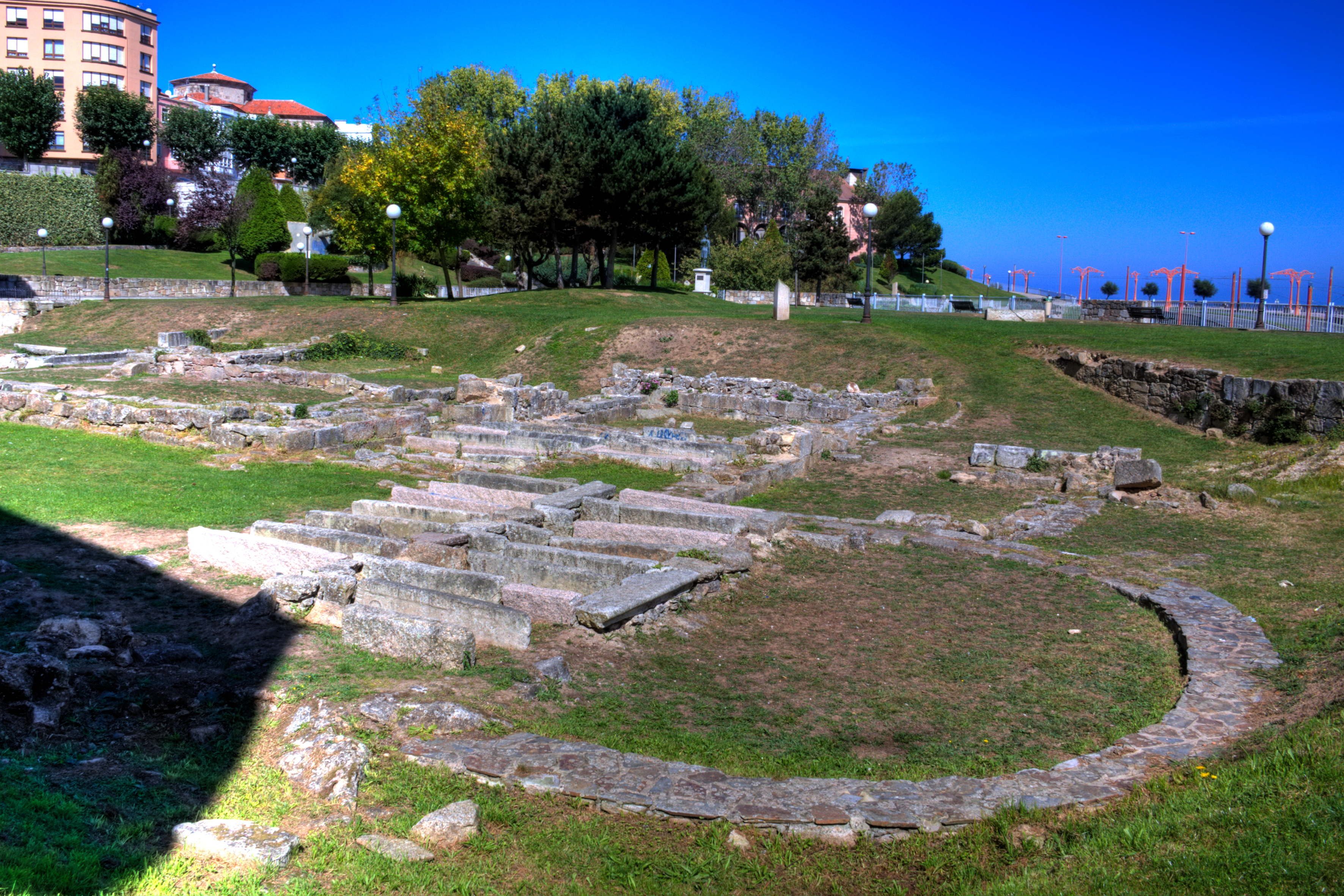 A Coruña - Ruinas de la Iglesia del Ex-convento de San Francisco